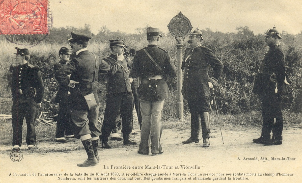 Frontière entre Mars-la-Tour en Vionville